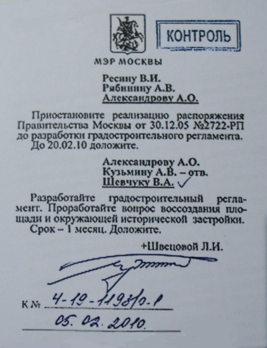 В начале 2010 года мэр Москвы Ю. М. Лужков распорядился проработать вопрос воссоздания исторической Хитровской площади, являвшейся композиционным и смысловым центром Выявленного объекта культурного наследия «Достопримечательное место „Хитровка“ с окружающей застройкой в составе кварталов № 123, 124, 125, 126, 127»